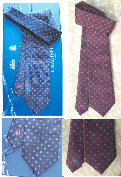 Cravatte FIR-Marinella